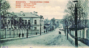 Мінскае рэальнае вучылішча